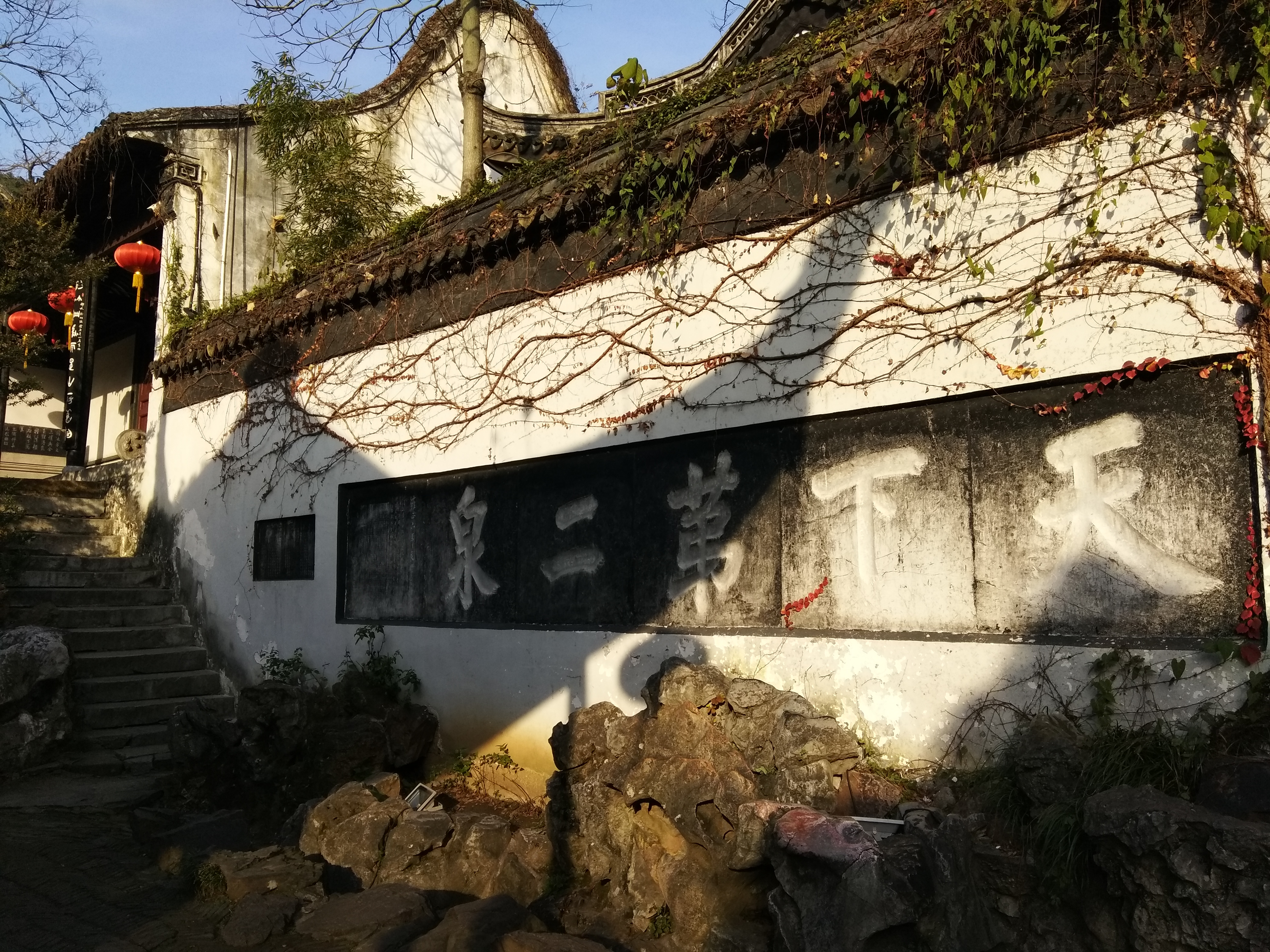 中文（中国大陆）: 天下第二泉的碑刻